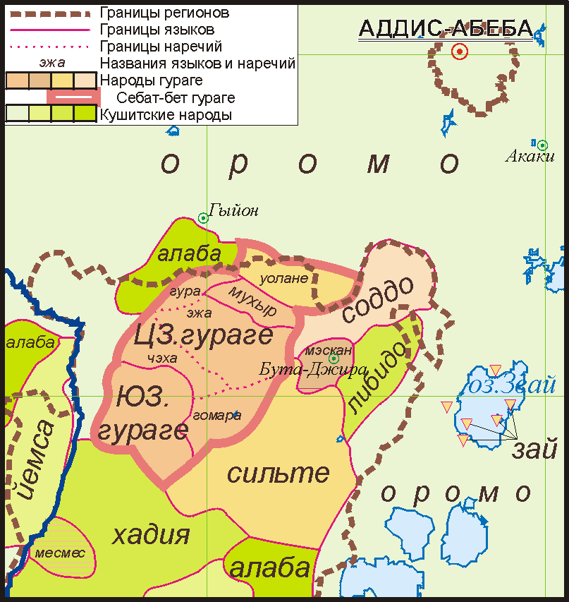 Map of Gurage language area (Ethiopia). Карта языков гураге (Эфиопия).